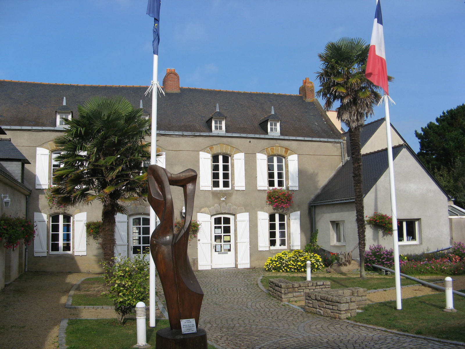 Mairie de Pénestin